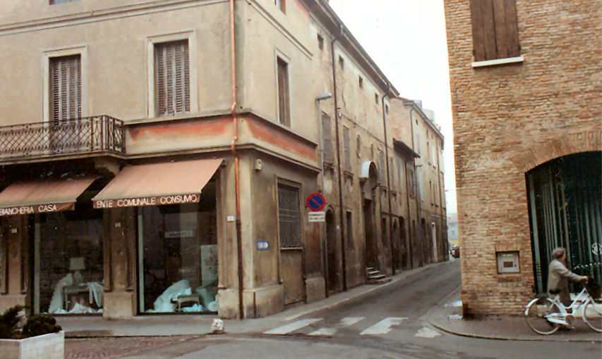 La sinagoga di Carpi.